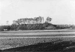 Der Schwarze Hucken in Minden-Bölhorst war eine Abraumhalde der örtlichen, mittlerweile stillgelegten Zeche im Mindener Revier in Nordrhein-Westfalen. Die Halde wurde 1952/53 abgetragen, weil man den Abraum beim Flutdamm für die Portabrücke verwendete. Heute erinnert nur noch ein Straßenname (Huckenstrasse) und das Restaurant Zum Hucke an den schwarzen Hucken.